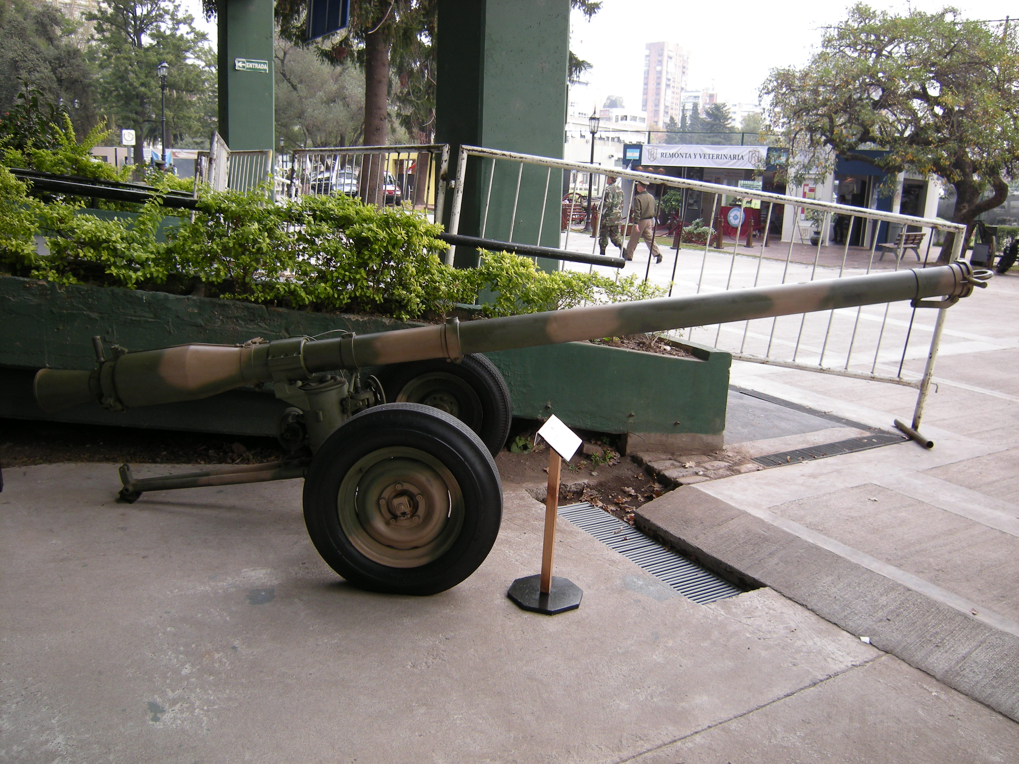 Cañón sin retroceso Czekalski de 105 mm del Ejército Argentino.